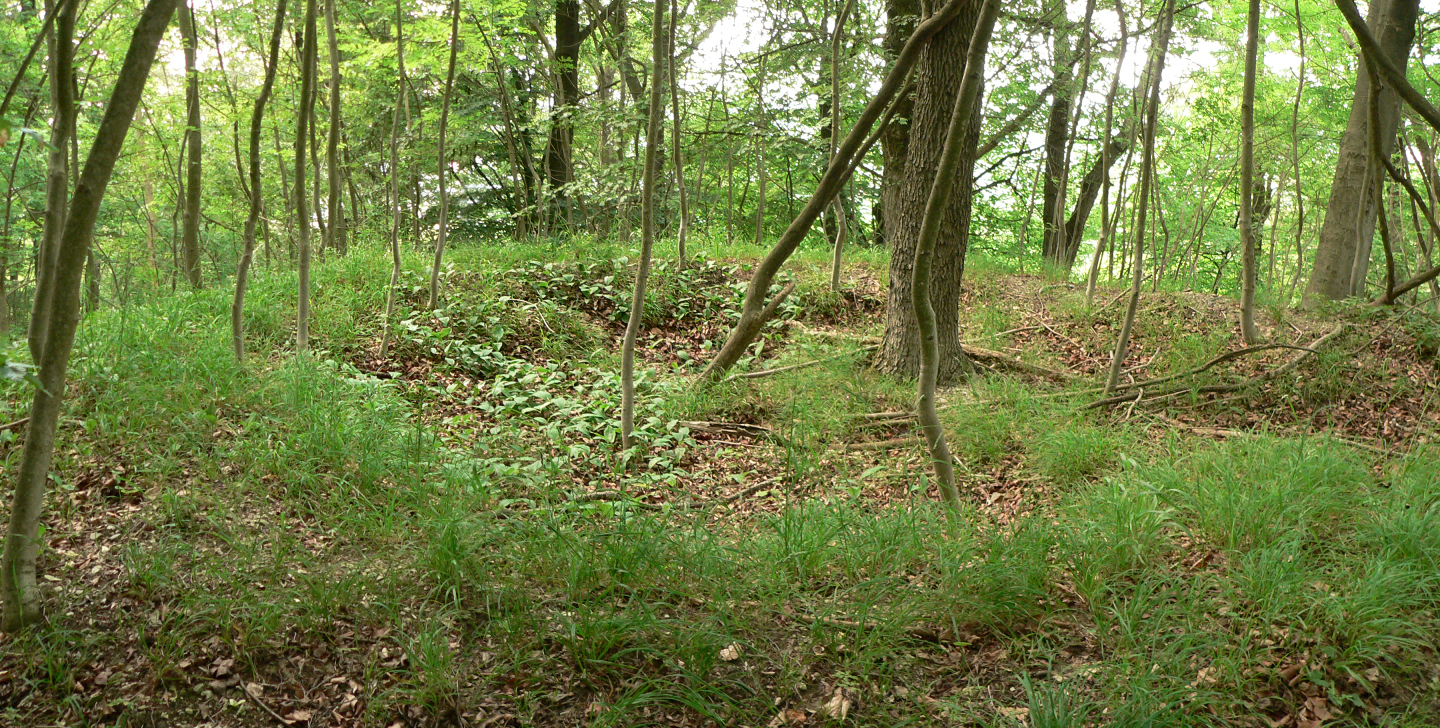 Burghügel der Alten Burg (Bühle) mit Resten des Rundturms